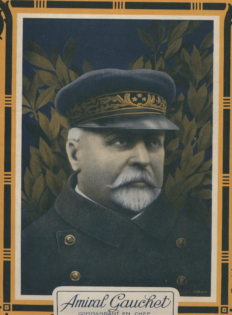 Dominique Gauchet amiral lors de la Première guerre mondiale en couverture du journal Le Pays de France N°121 .